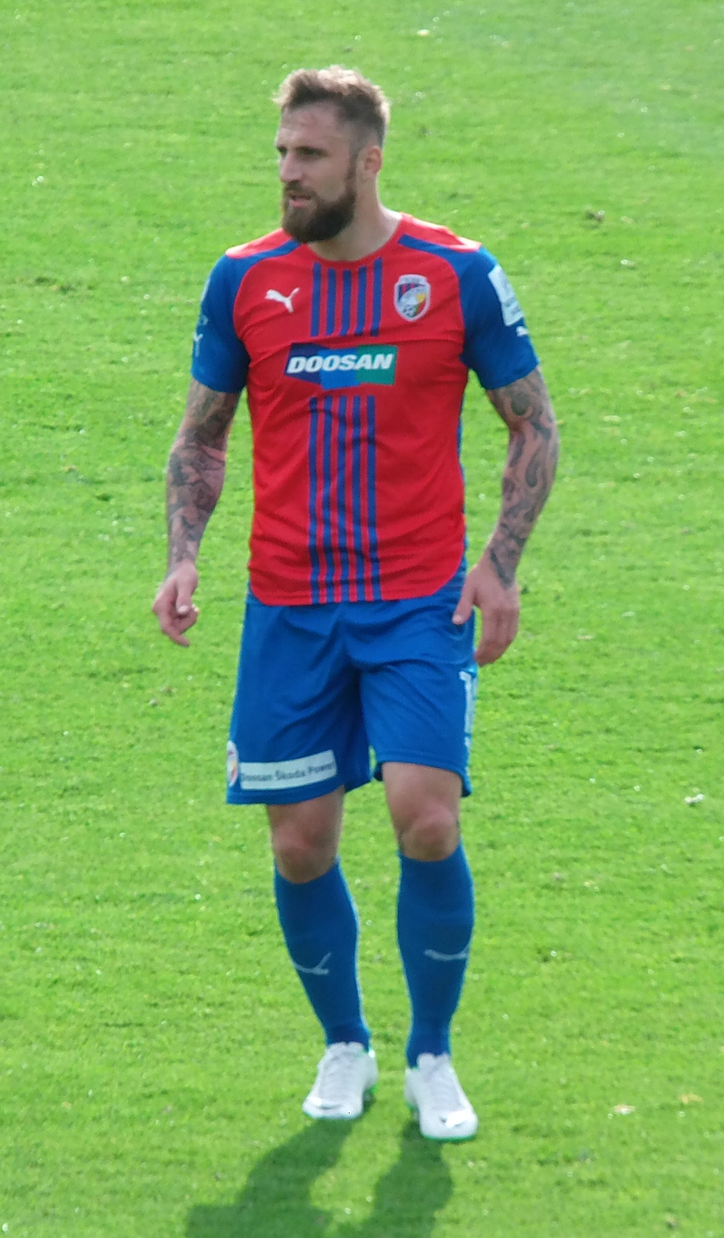 Jan Holenda - květen 2015